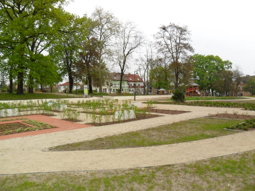 Gubin - Park im. gen. A. Waszkiewicza